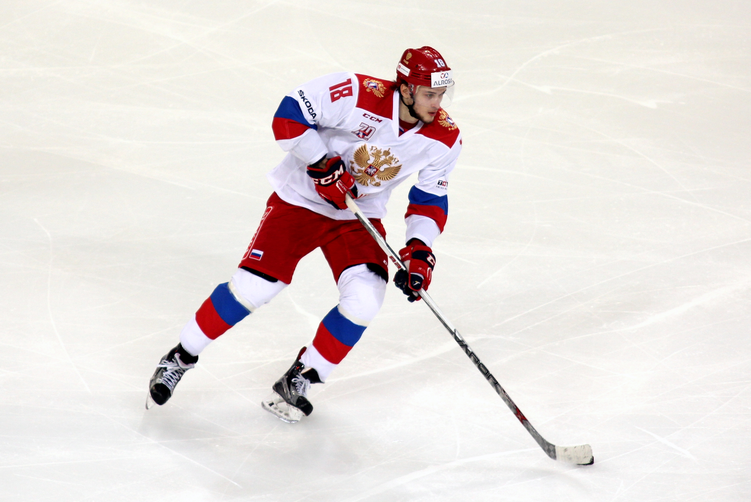 Maxim Mamin (R 18).